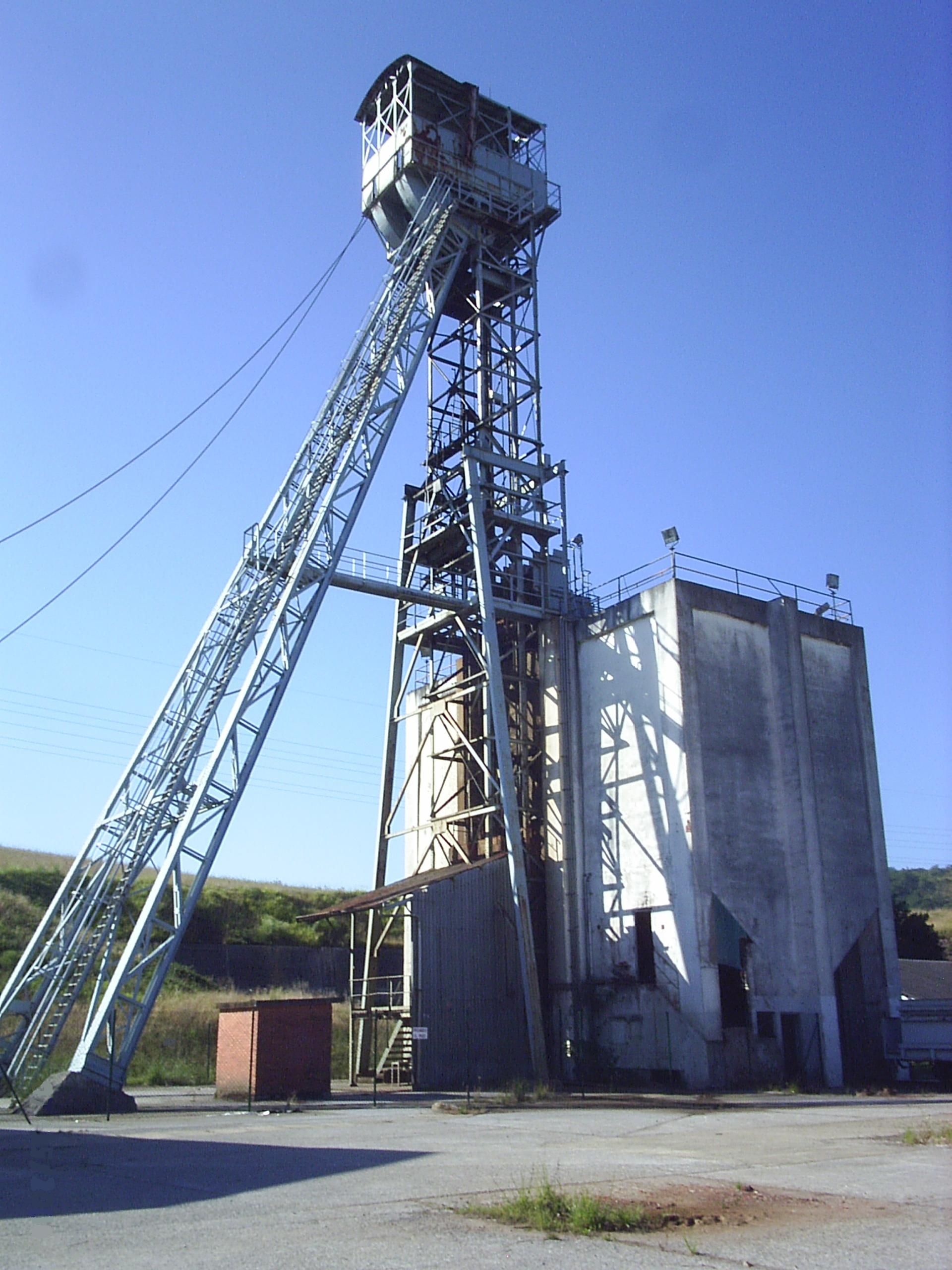 Pozo Santa Amelia, Reocín, Cantabria, España